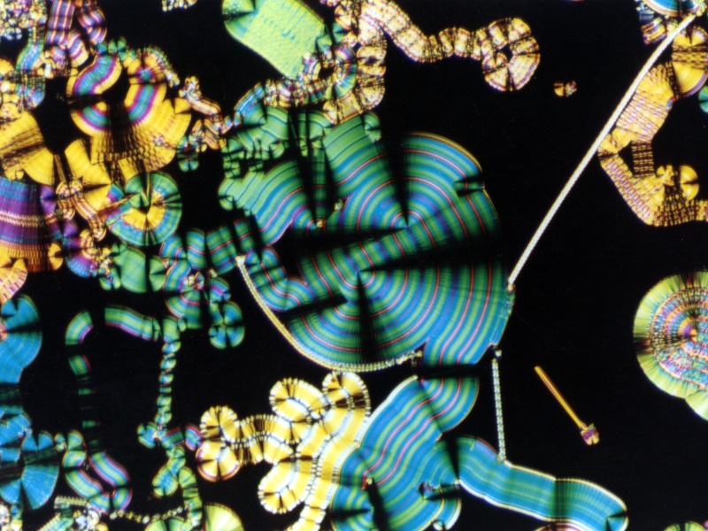 Polarisationsmikroskopische Aufnahme einer sogenannten B7-Phase von bent-core („bananenförmigen“) Mesogenen; charakteristische Textur 2, Flüssigkristall.